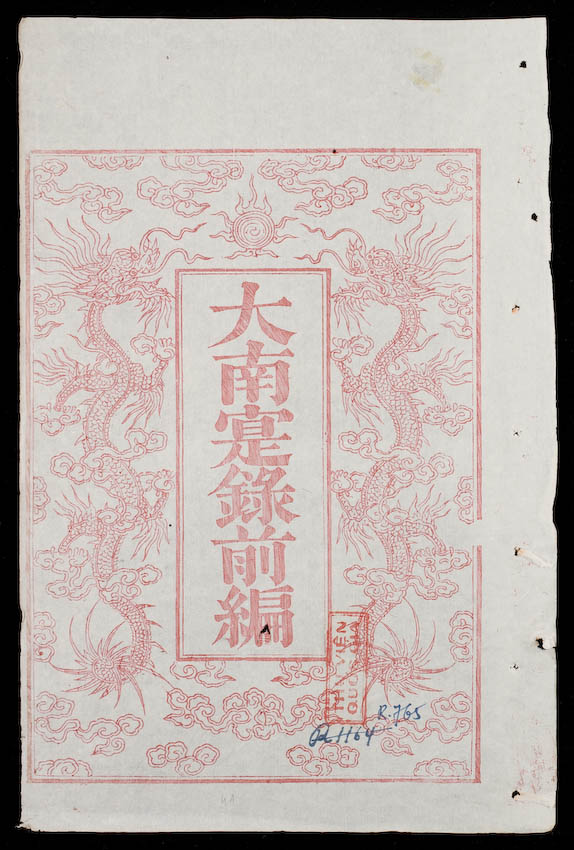 大南寔錄前編（"Đại Nam thực lục tiền biên"）